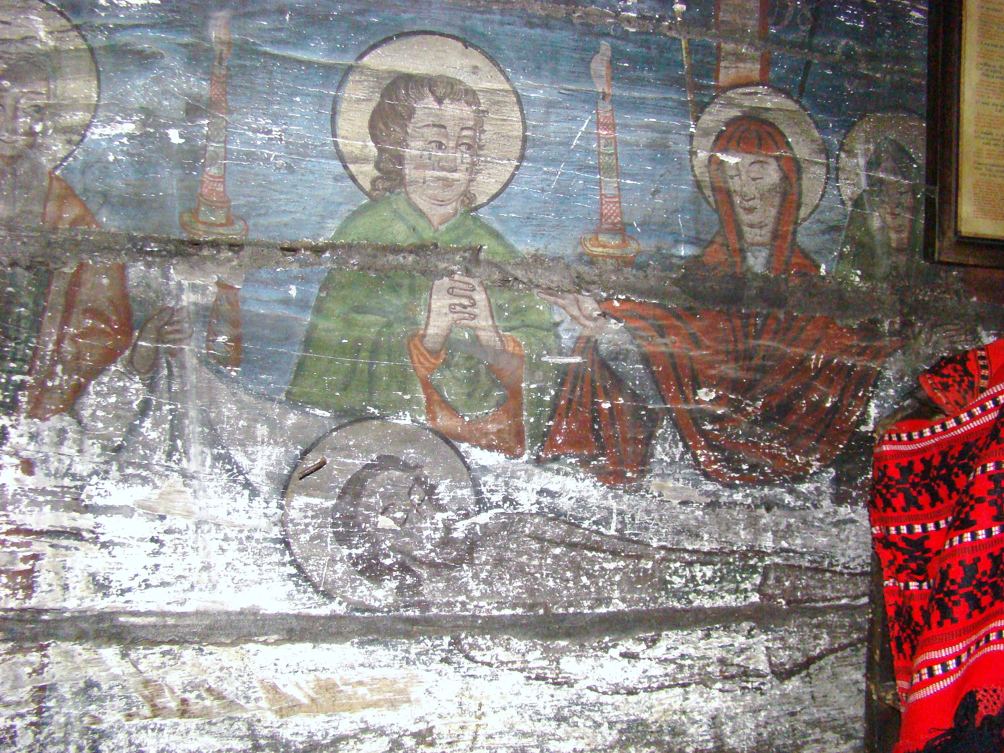 Biserica de lemn din Osoi